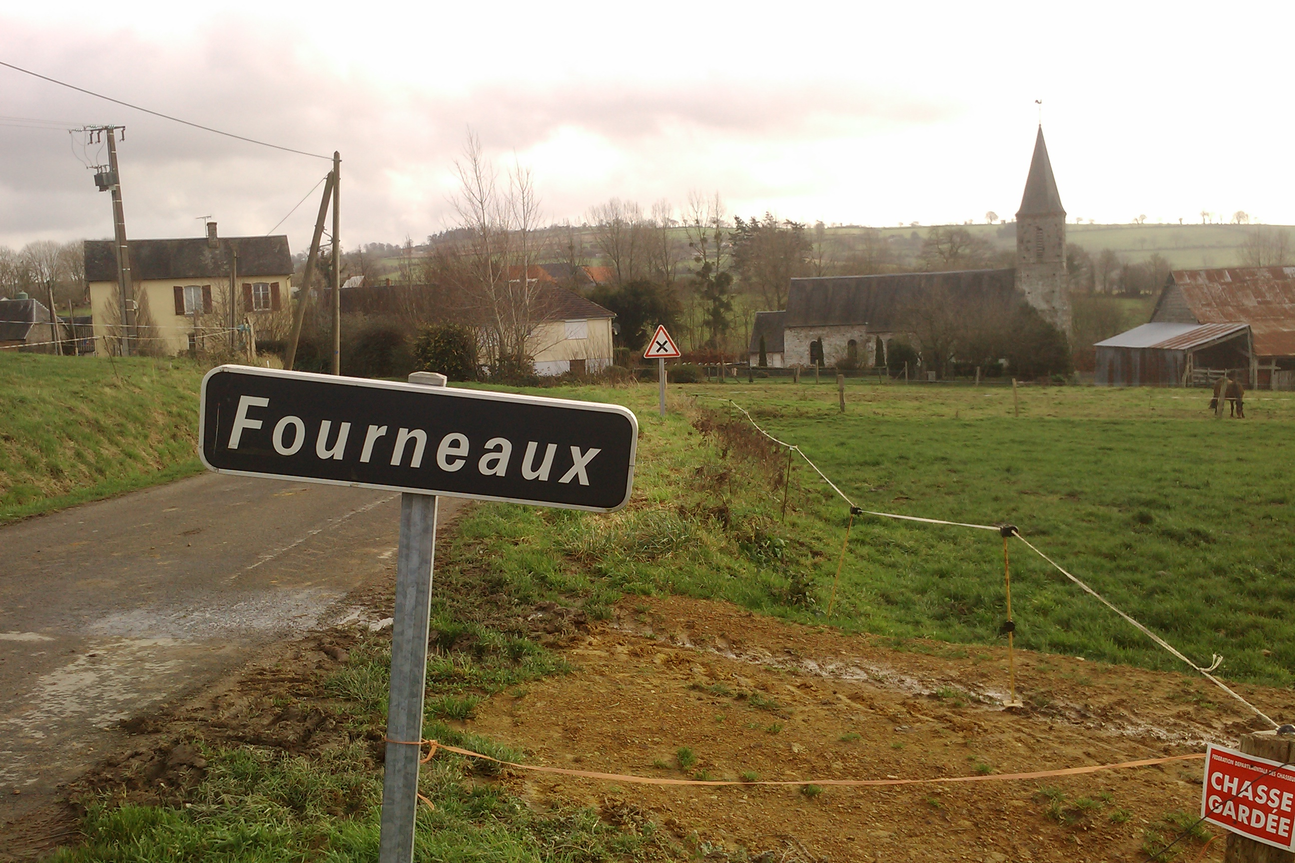 Fourneaux (Manche)